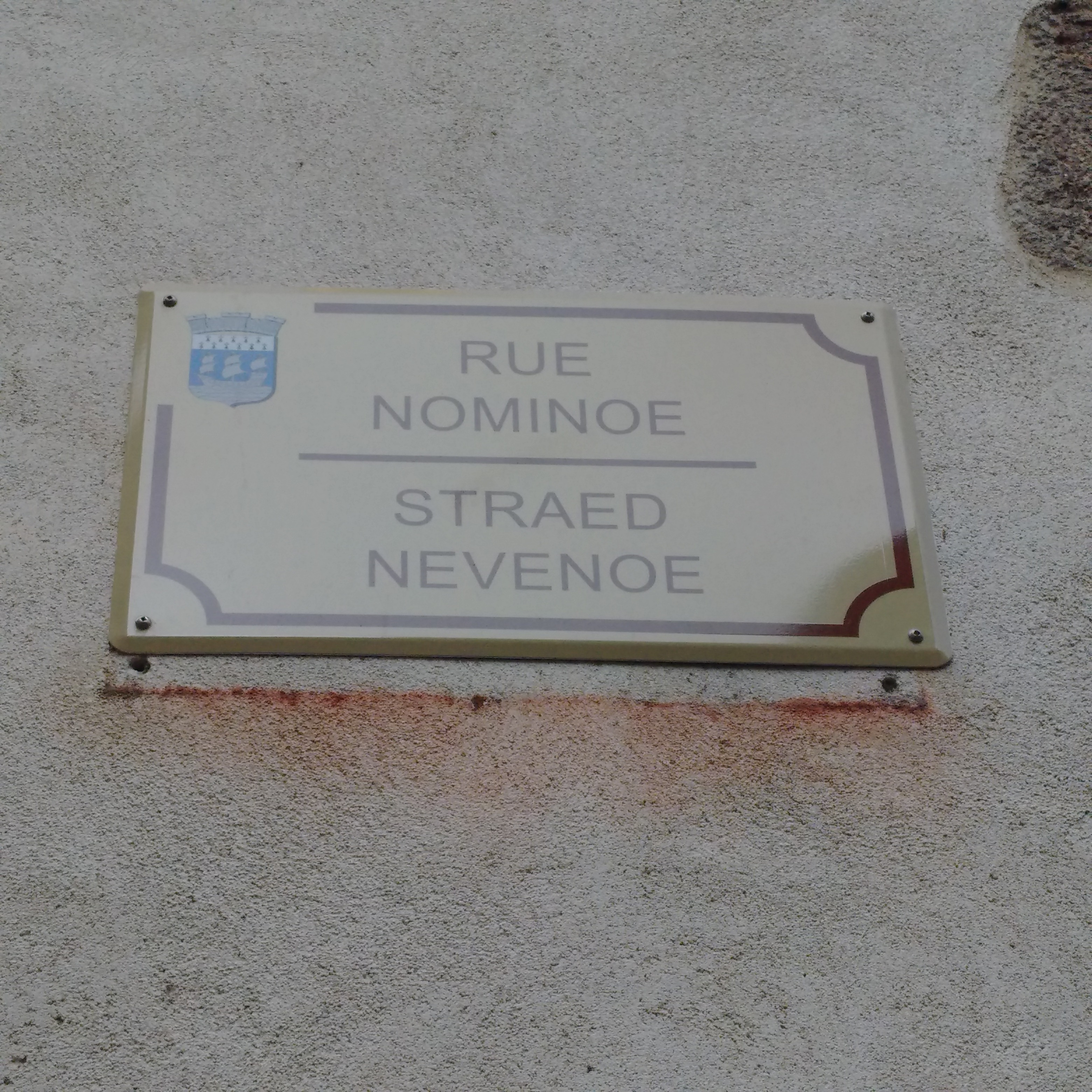 Plakenn straed Nevenoe e Redon, nepel diouzh al lise Sant Salver.